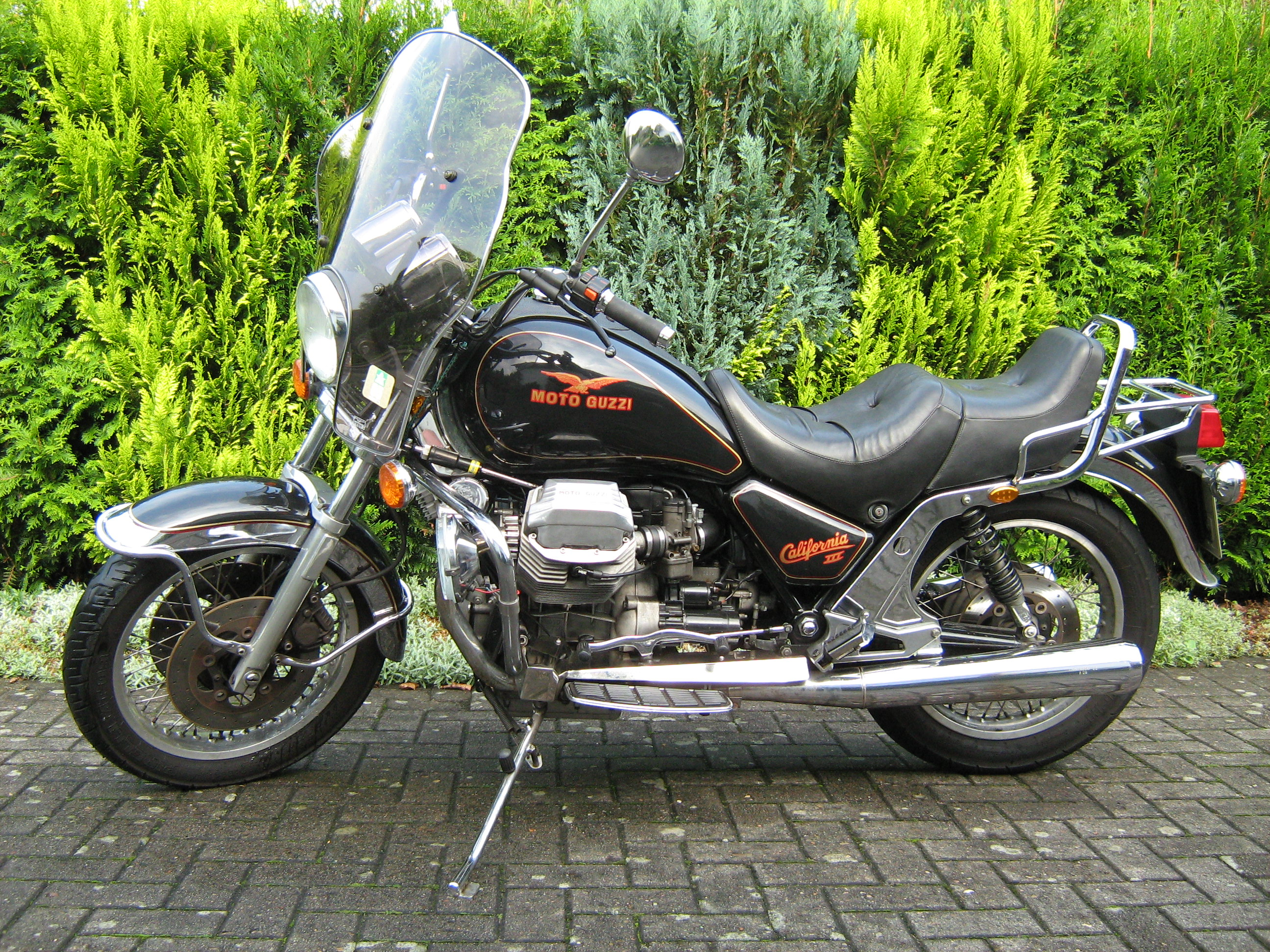 Moto Guzzi California III Bj. 92